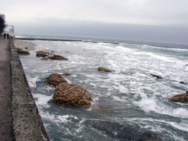 Пляж "Дельфін" взимку